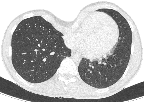 coupe scaner d'un thorax pectus excavatum